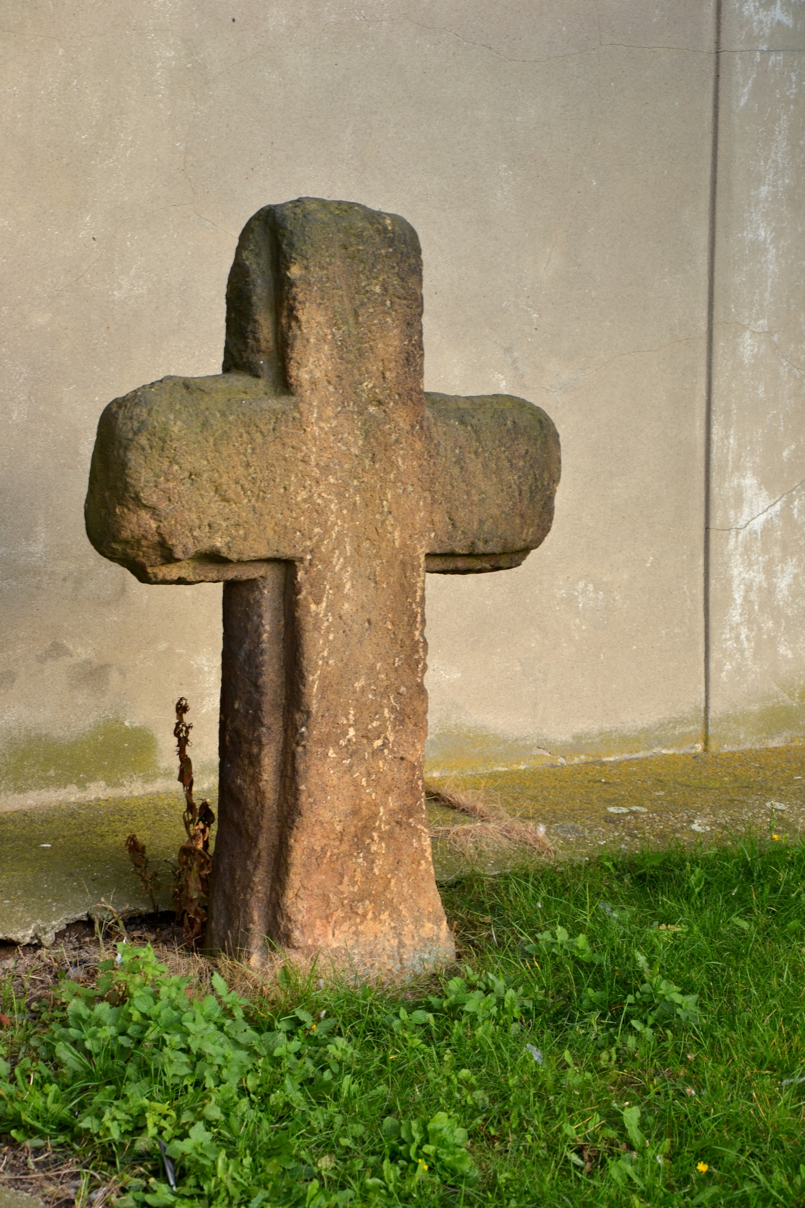 Smírčí kříž přemístěný z Vrchnice do Strupčic